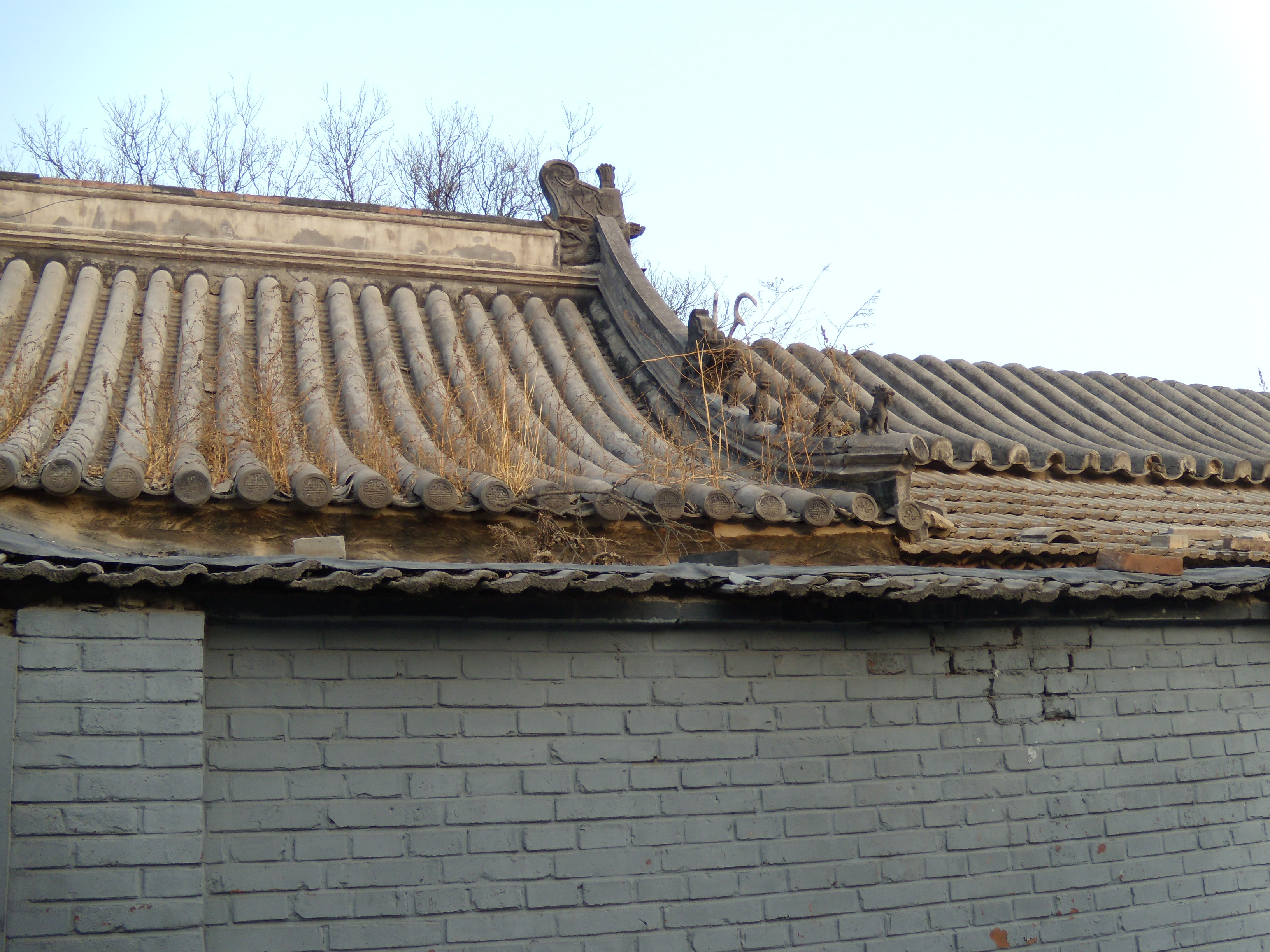 北京护国寺